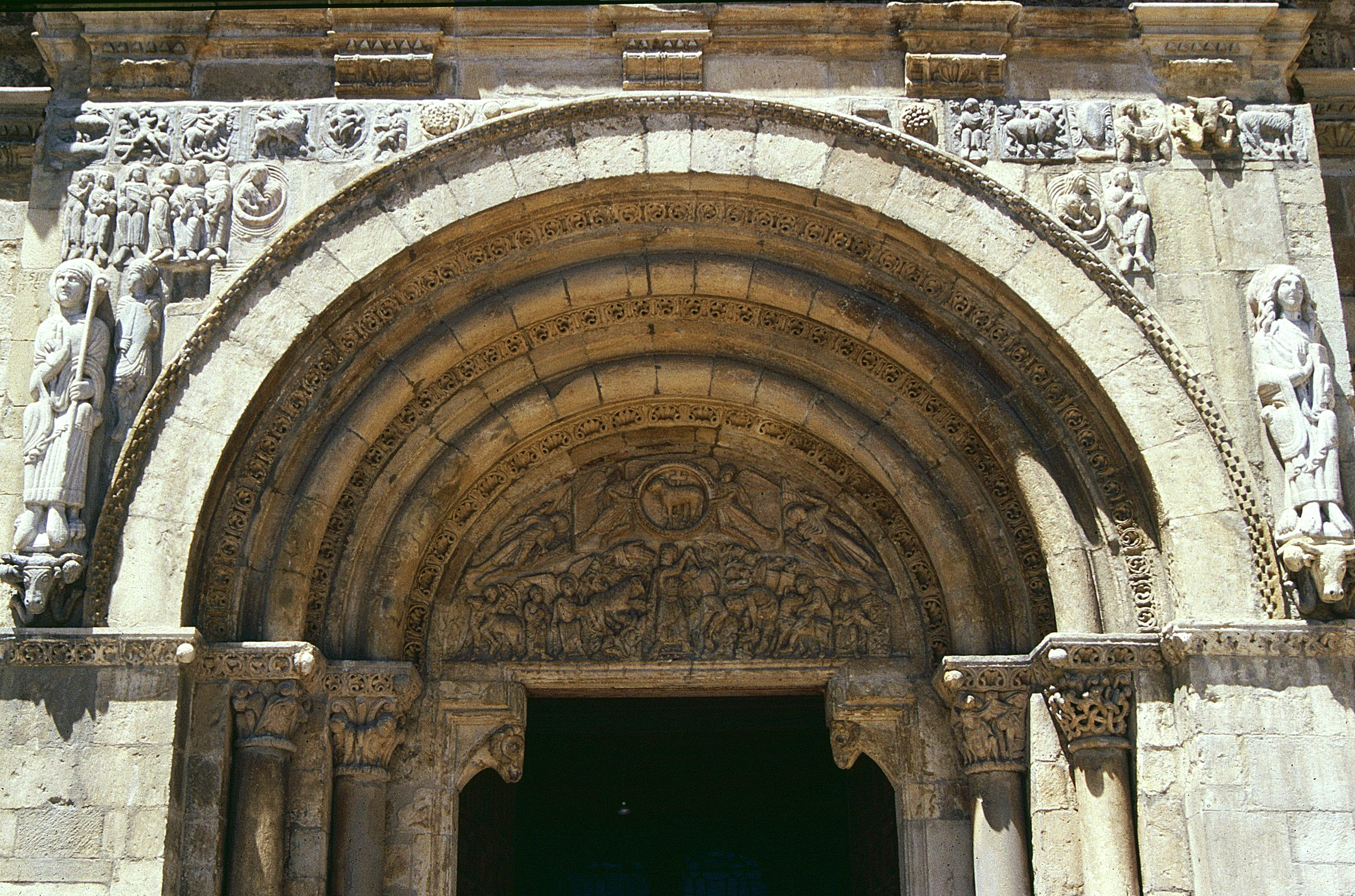 León: Collegiata de San Isidoro, Tympanon